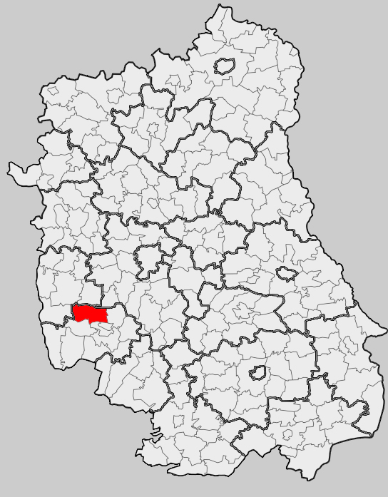 Map of gmina Urzędów, Kraśnik county, Lublin voivodship Mapa gminy Urzędów, powiat kraśnicki, województwo lubelskie